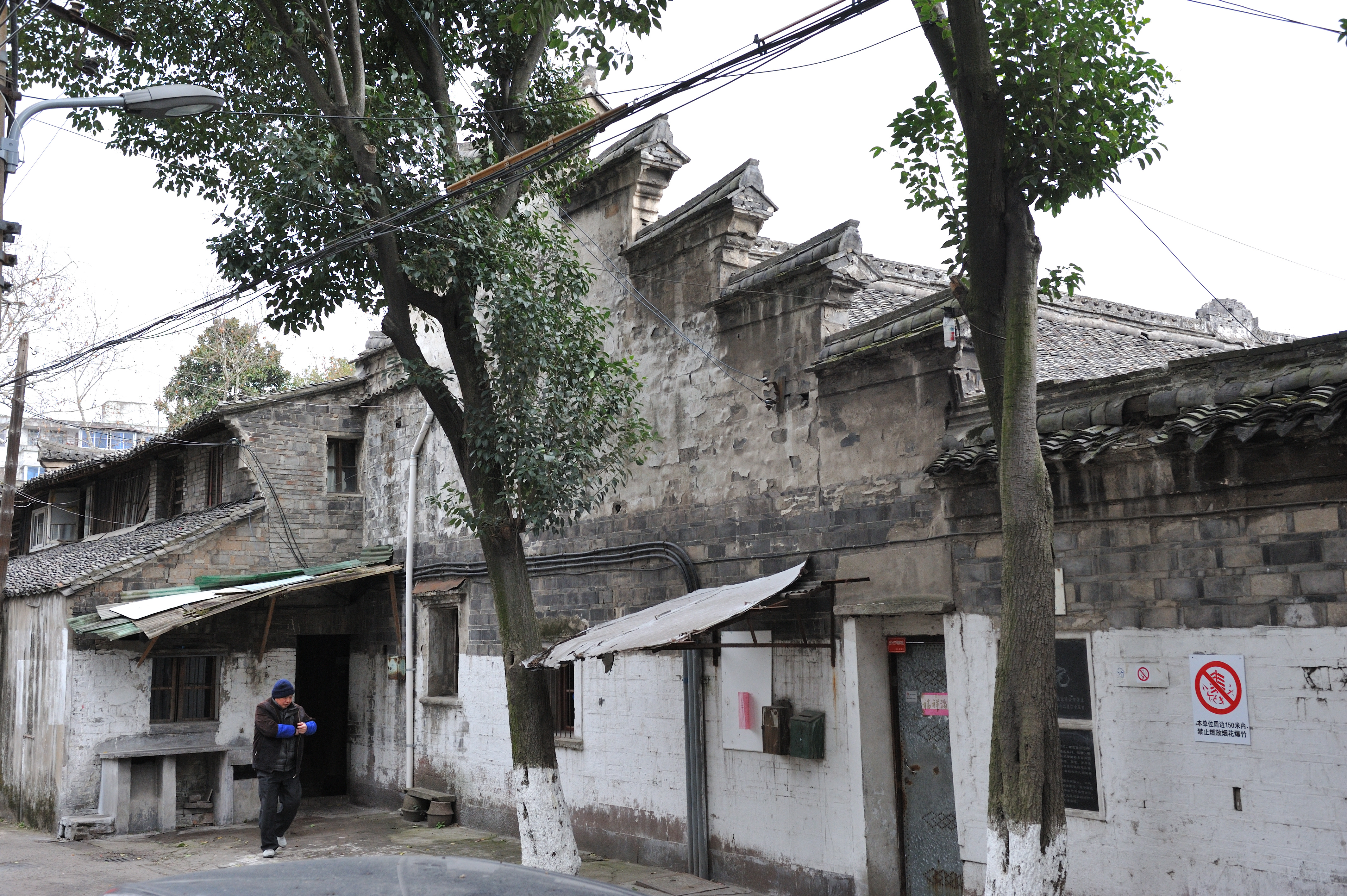 宁波秀水街吴宅